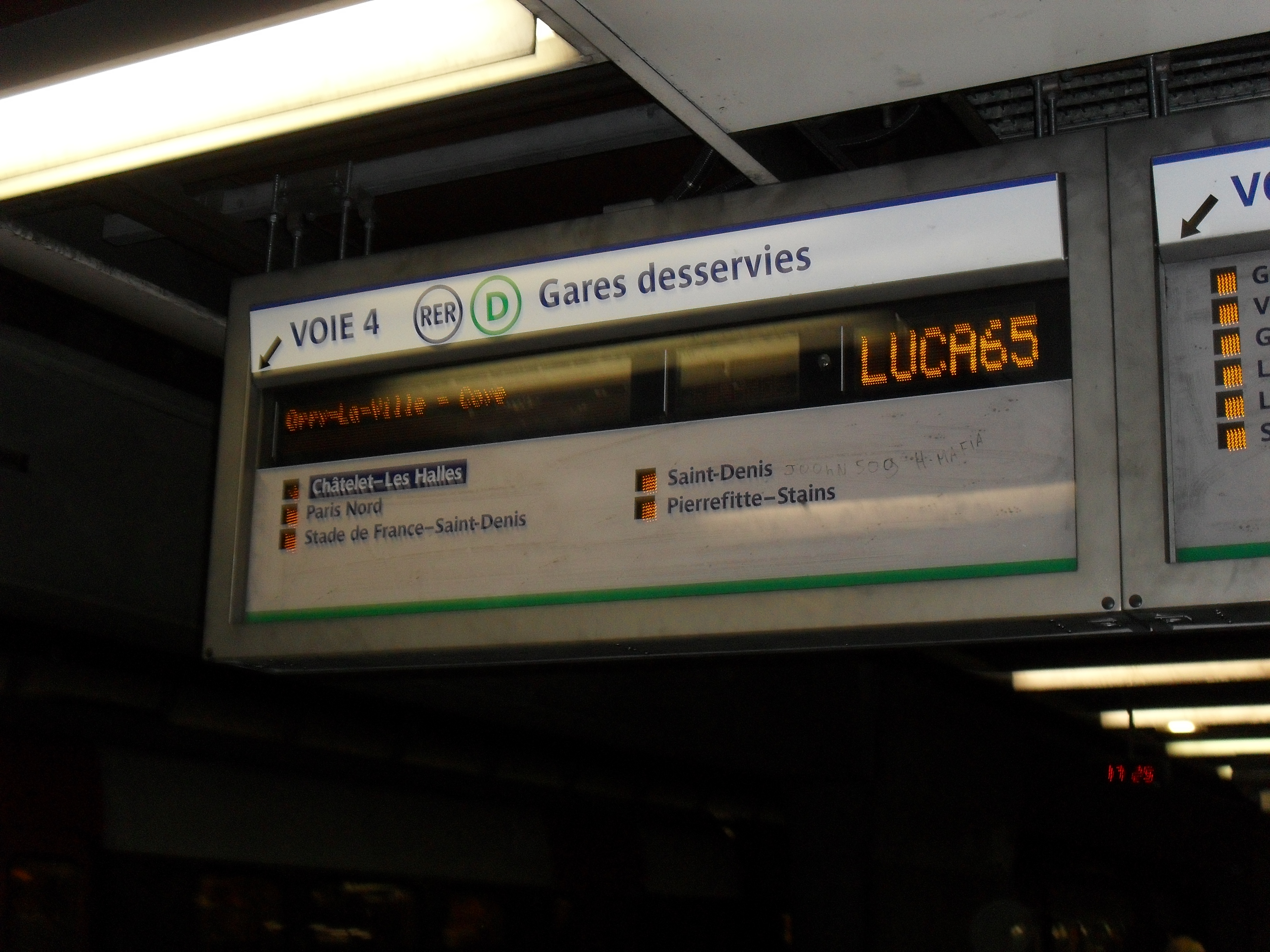 SIEL RER D à Châtelet